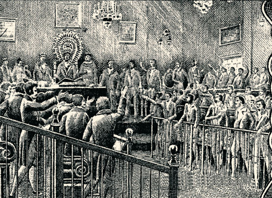 Creación de Bolivia 1825 Sucre Casa de la Libertad.